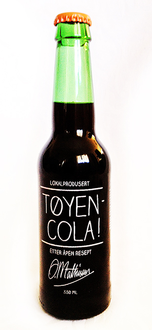 Tøyen-Cola fra Oslo 2015, laget etter åpen resept